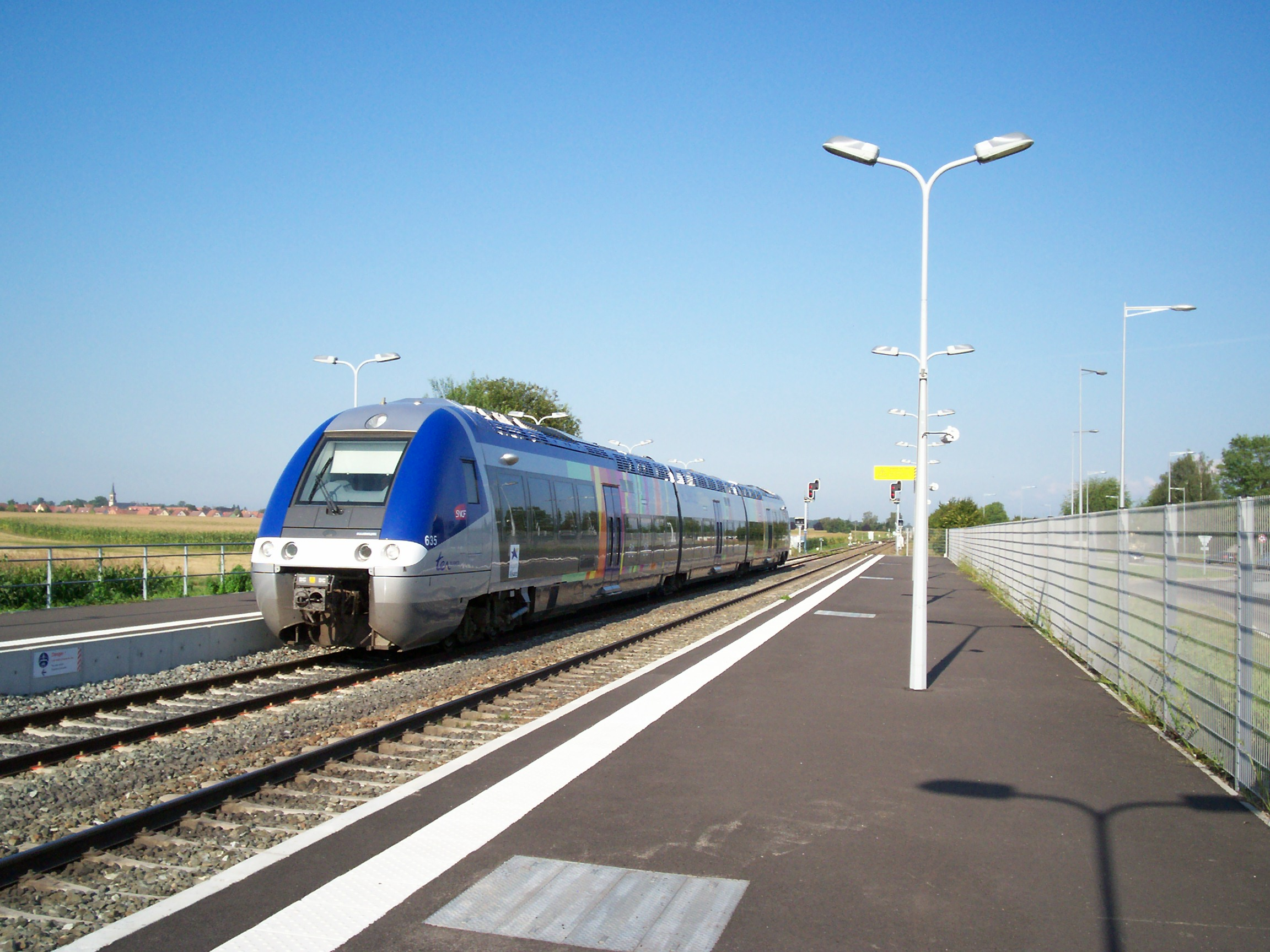 X 76500 TER Alsace